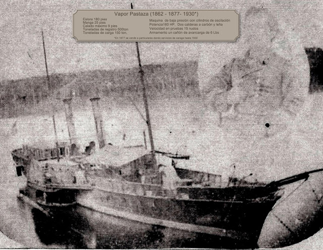 Vapor peruano Pastaza llegando a Iquitos